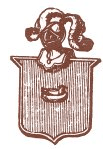 Very First Nestlé's logo